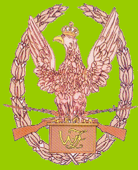 Odznaka Wzorowego Żołnierza z 2002roku